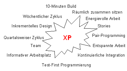 XP-Evolution-Hauptpraktiken